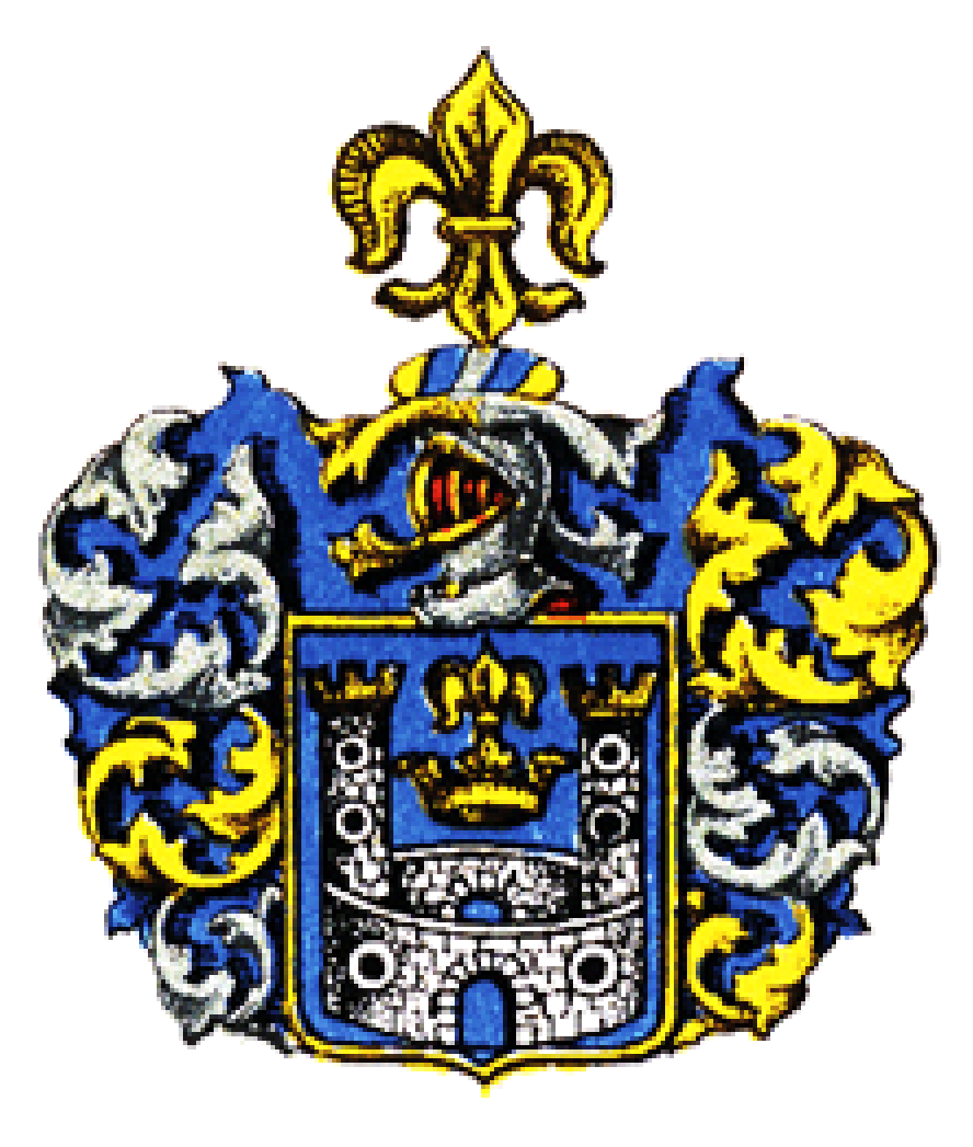 Wappen der Engelbrecht bzw. von Engelbrechten, auch von Engelbrechten-Ilow, eines ursprünglich pommerschen Geschlechts, einst zu Greifswald (vgl. Stammtafeln und Wappen derjenigen Familien deren Angehörige die Bürgermeister- oder Ratswürde der Stadt Stralsund bekleidet haben) ratsverwandt (bzw. das Wappenbild, bereits 1486 und 1487 belegt, herkommend von den kognatischen Vorfahren, dem seit 1438 urkundlichen Greifswald-Stralsunder Ratsgeschlecht Segeberg (vgl. dazu auch das GHdA, Adelslexikon Bd. III, Limburg/L. 1975, S. 150) -der Stammvater Wilken Engelbrecht, Ratsherr in Greifswald von 1489 bis 1502, war verheiratet mit Kunigunde Gnoyen. Der Sohn Joakim Engelbrecht war Ratsverwandter zu Greifswald 1503. Er starb 1544. Verheiratet war er mit Gertrude Segeberg, Tochter des Greifswalder Ratsverwandten Henrik Segeberg. Deren Sohn war Johan Engelbrecht, Bürgermeister von Greifswald im Jahr 1580; pommerscher Landrat, gestorben 1598. War verheiratet mit Gertrude Groenenberg, gestorben 1587. Die Grabplatte mit Wappen des Nachfahren Peter Engelbrecht zu St. Marien in Greifswald, die Grabplatte der Regina Engelbrecht und ihrem Mann Martin Völschow mit Allianzwappen zu St. Nikolai in Greifswald.) Das nobilitierte Geschlecht der Engelbrechten konnte sich späterhin u.a. auch nach Preußen und Bayern ausbreiten und gelangte zu einigem Ansehen. Zweige der Familie bestehen bis heute fort.